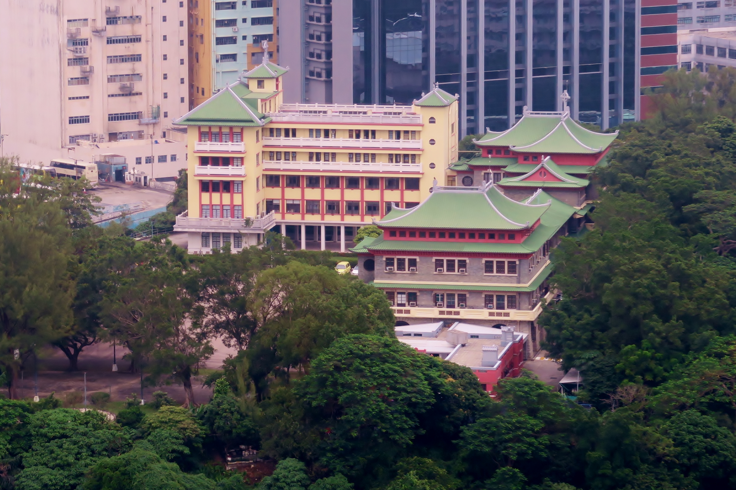 中文（香港）: 攝於鴨脷洲